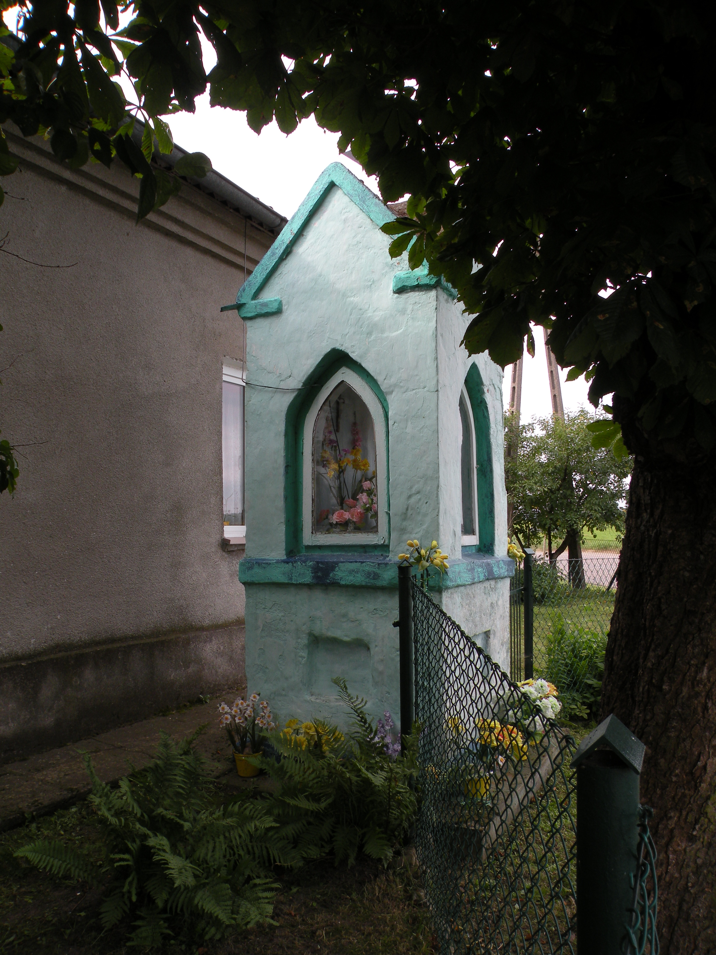 Kapliczka warmińska w Gadach, na skraju wsi